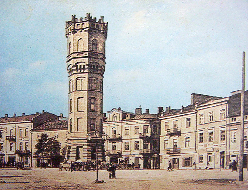 Nie istniejąca obecnie lubelska wieża ciśnień (Plac Wolności).